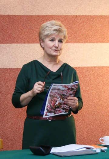 Spotkanie zorganizowane przez Bożenę Sławiak - Torzym, lubuskie (2012-12-18)